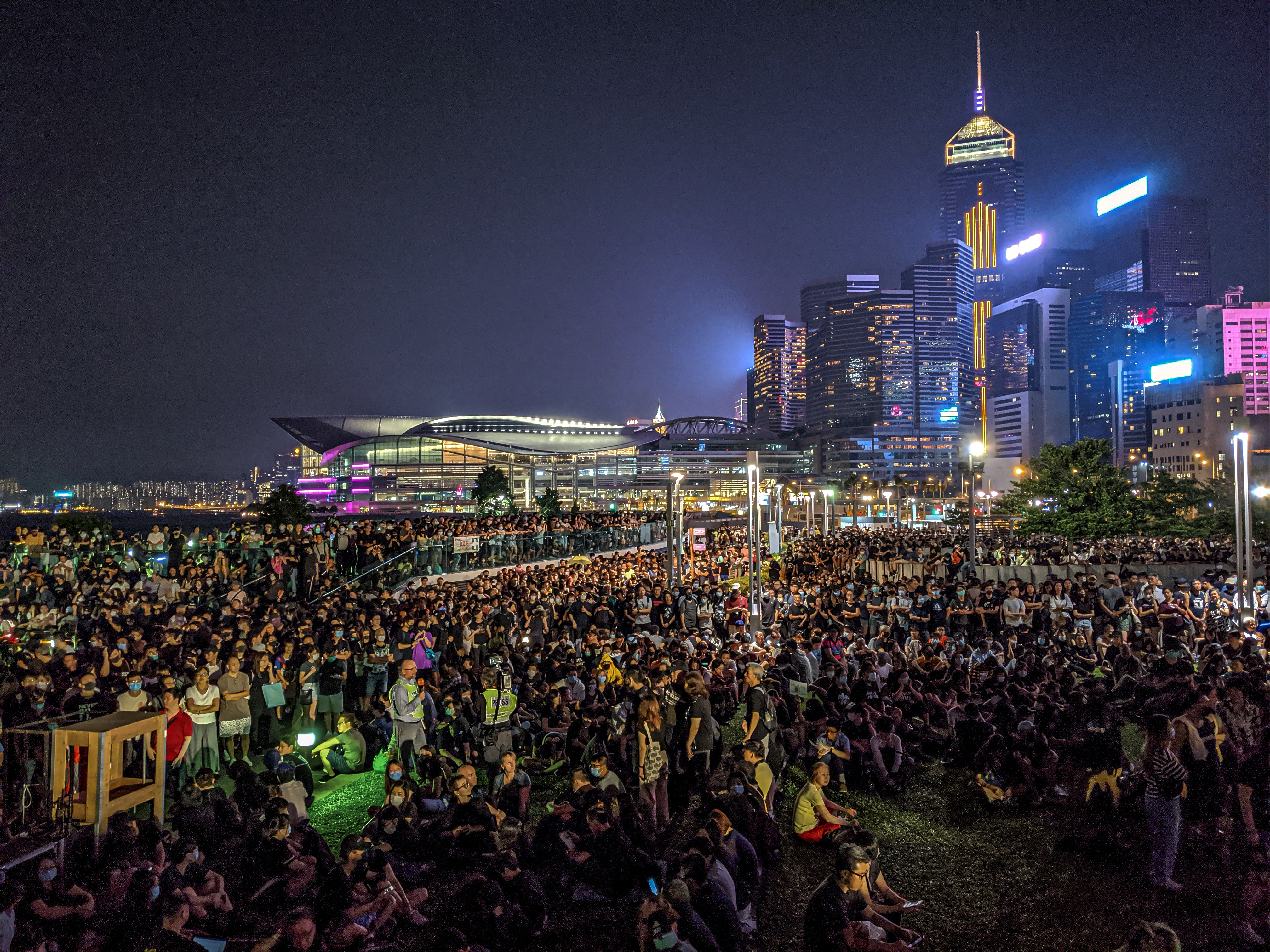 5th Anniversary Umbrella Movement – 傘運五周年, 28 September 2019 (Admiralty, Hong Kong)